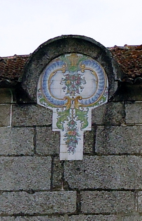 Felgueiras Jugueiros Cruzeiro